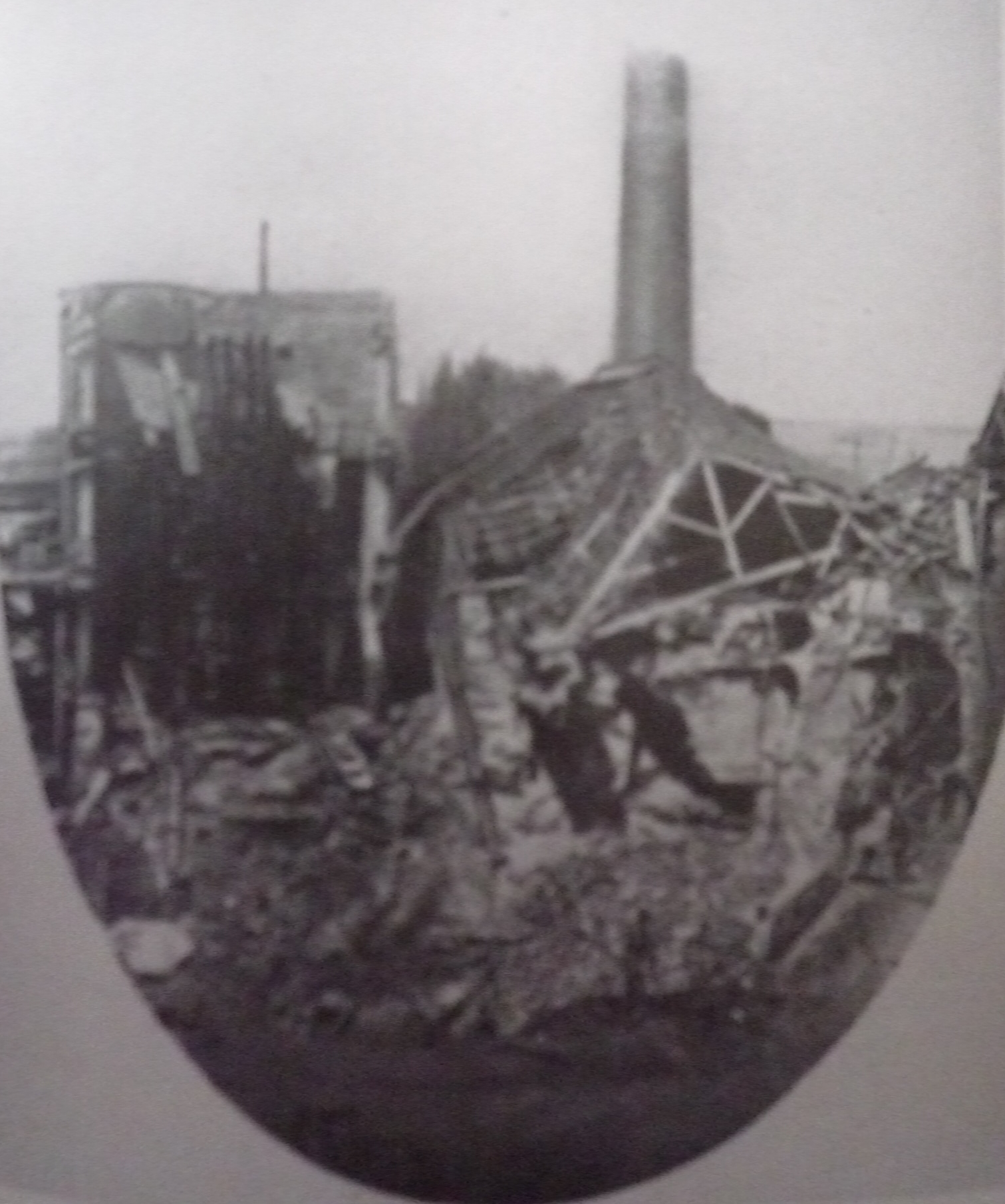 La fosse no 2 dite Saint-Émile de la Compagnie des mines de Marles était un charbonnage du bassin minier du Nord-Pas-de-Calais constitué d'un seul puits situé à Marles-les-Mines, Pas-de-Calais, Nord-Pas-de-Calais, France. L'avaleresse no 1 est localisée sur le site. Le chevalement de la fosse no 2 avec les parties anciennes du bâtiment de la machine d'extraction sont inscrits aux monuments historiques le 6 mai 1992. La fosse est également inscrite sur la liste du patrimoine mondial par l'Unesco le 30 juin 2012 et y constitue le site no 101.